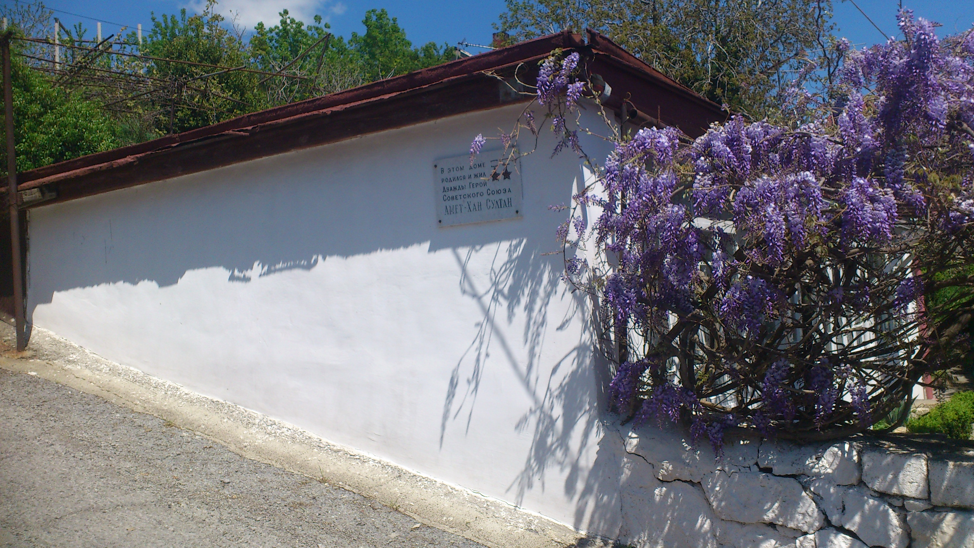 Дом, где вырос Амет-хан Султан в Алупке. Мемориальная доска установлена в крымском городе Алупка (улица Кузериных, дом 4) на доме, в котором Амет-Хан Султан жил с середины 1920-х годов до 1937 года. Надпись на доске о том, что Герой родился в этом доме, не соответствует действительности.[1]